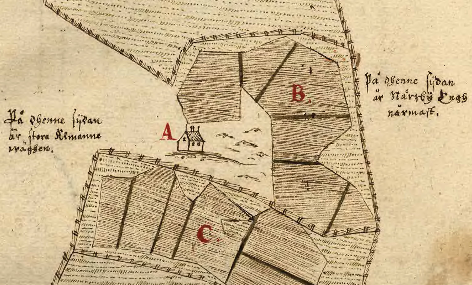 Del av Söderbys ägor. A: Söderby, skattehemman B: Norra gärdet C: Södra gärdet